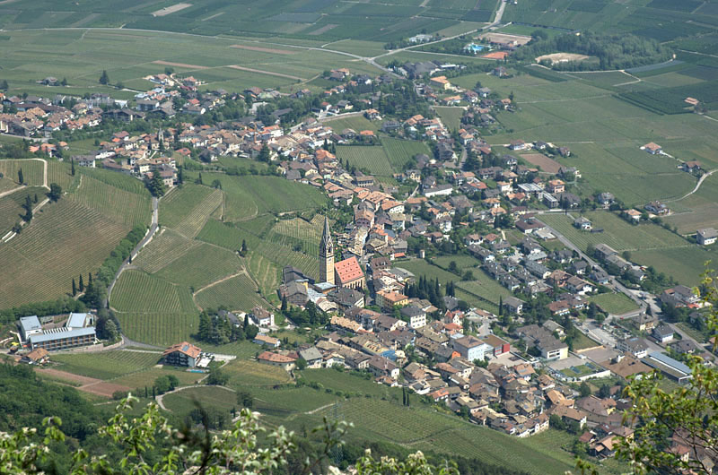 Tramin aus der Vogelperspektive